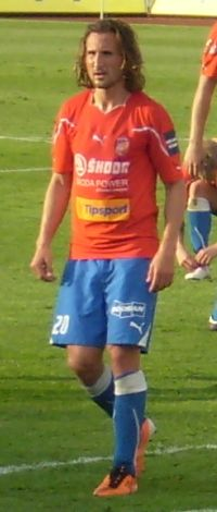 český fotbalista Petr Jiráček